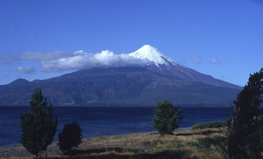 Chile: Sur Chico (= Kleiner Süden), Región X de los Lagos, Volcán Osorno vom Südufer des Sees Lago Llanquihué aus